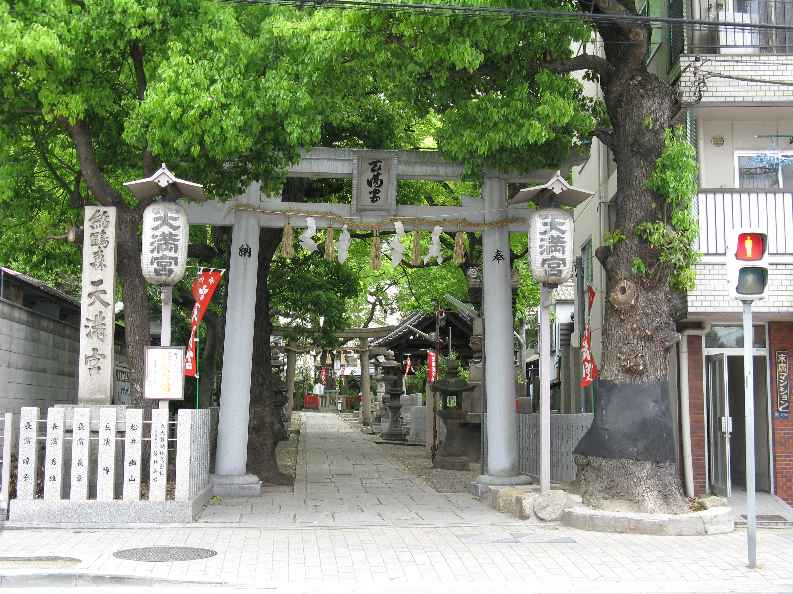 天満宮